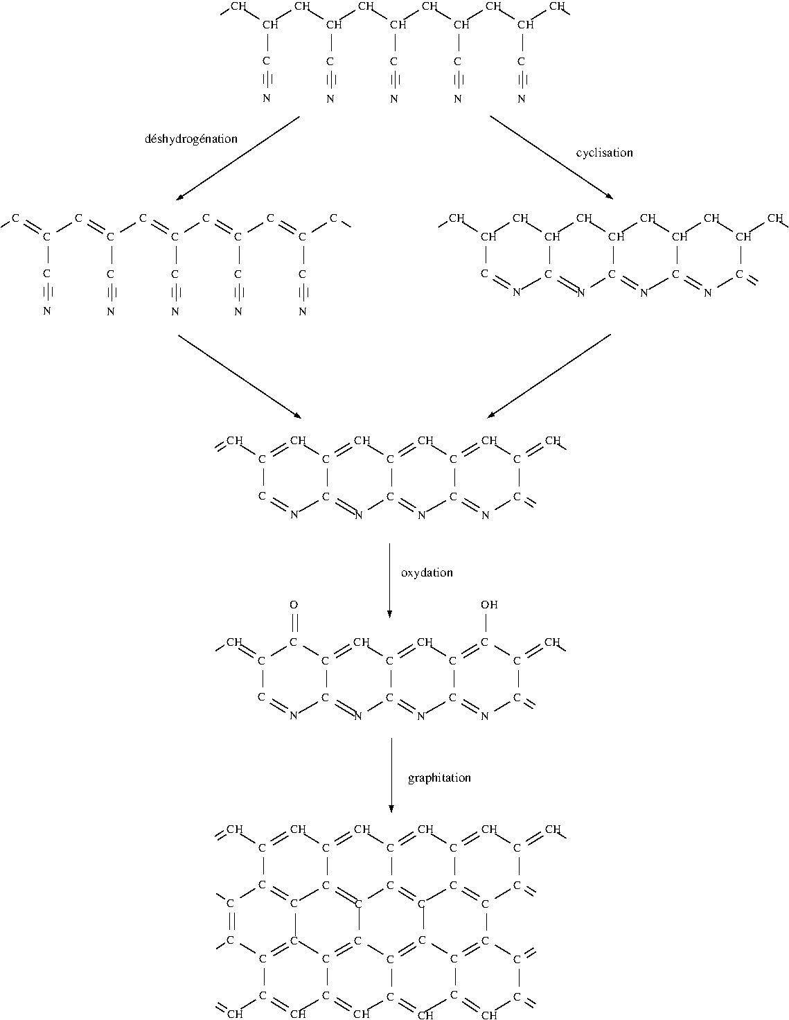 Mécanisme de formation d'un feuillet polyaromatique à partir d'une chaîne de polyacrylonitrile (Schéma construit à partir du mécanisme proposé dans L.M. Manocha. Carbon Fibers. Encyclopedia of Materials: Science and Technology (2 nd Edition), pp. 906-916, 2001).